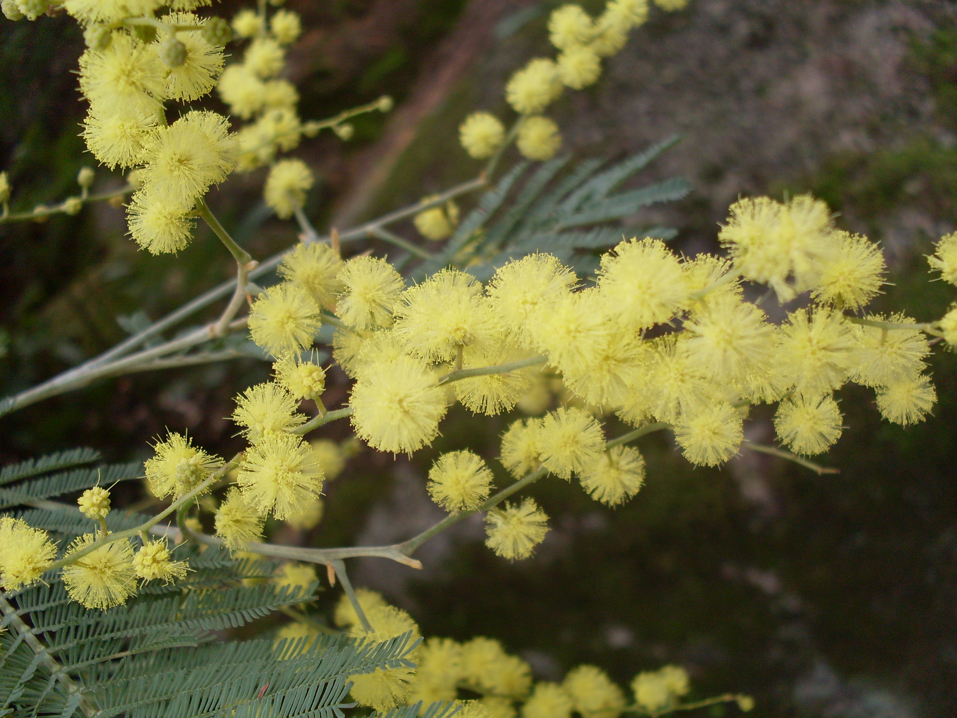 Мимоза